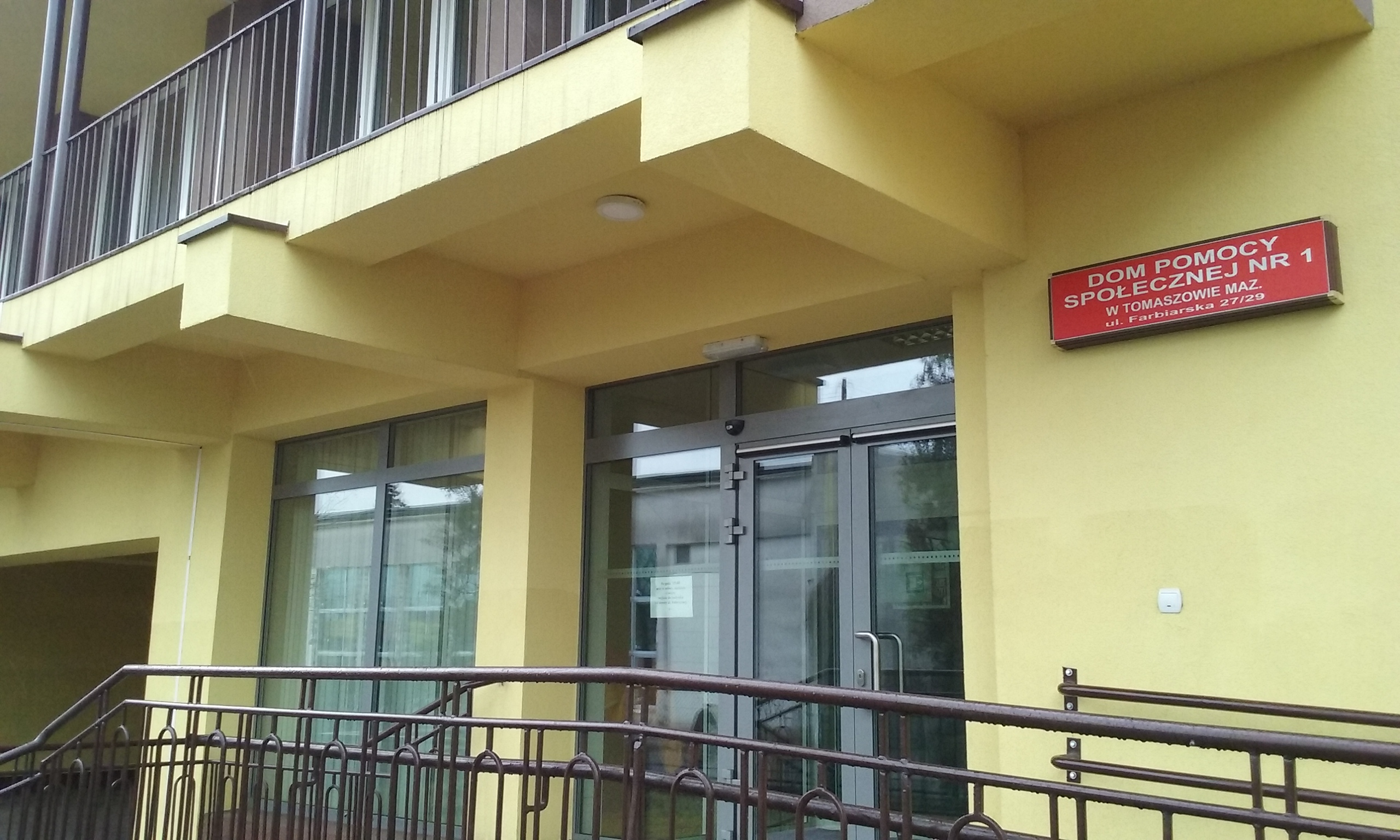 Jeden z Domów Pomocy Społecznej (całodobowego pobytu) w 60-tysięcznym Tomaszowie Mazowieckim, w województiwe łódzkim. Ulica Farbiarska 27.29